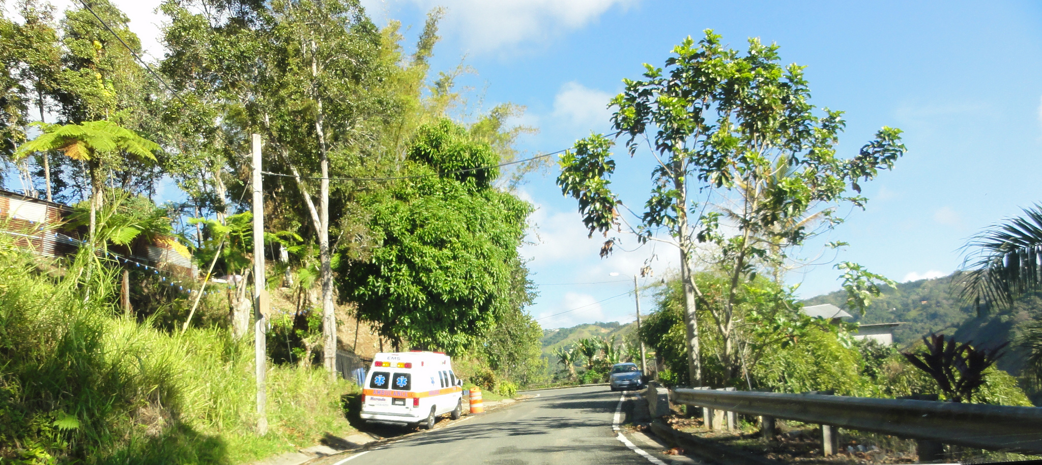 Area residencial en el Barrio Guaraguao (PR-515 Oeste), Ponce, PR